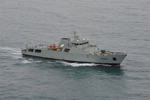 NPO Viana do Castelo em provas de mar